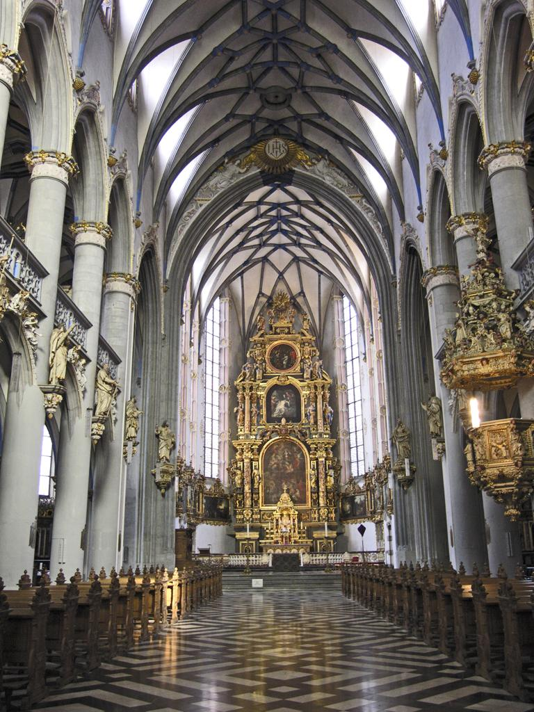 Innenansicht St. Mariä Himmelfahrt, Köln